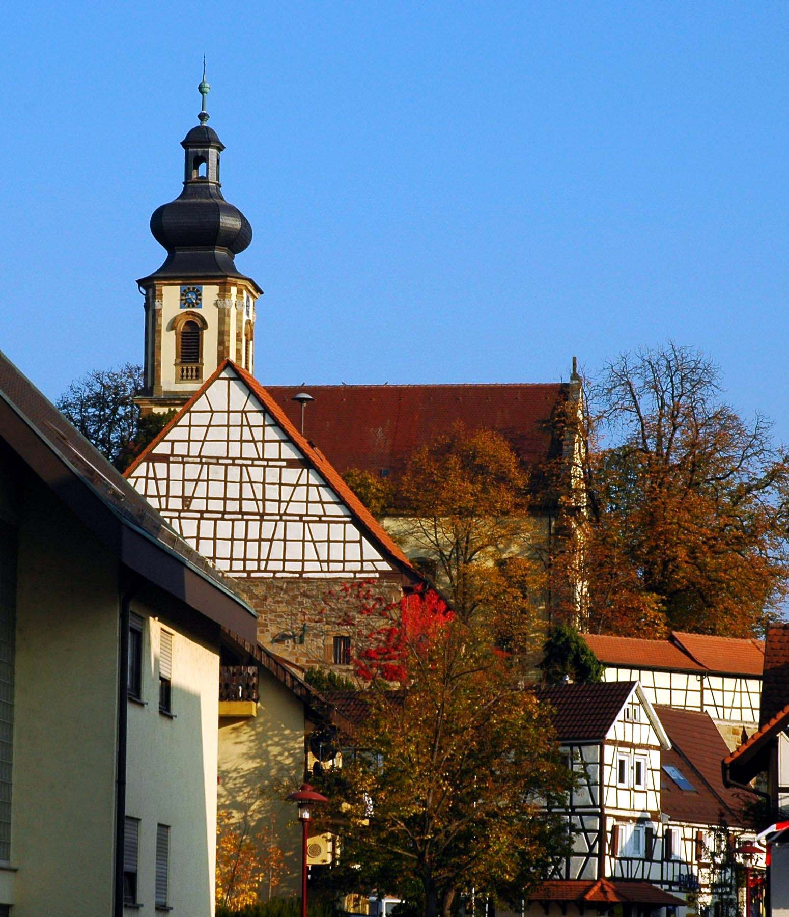 Kirche St. Michael in Erlenbach-Binswangen